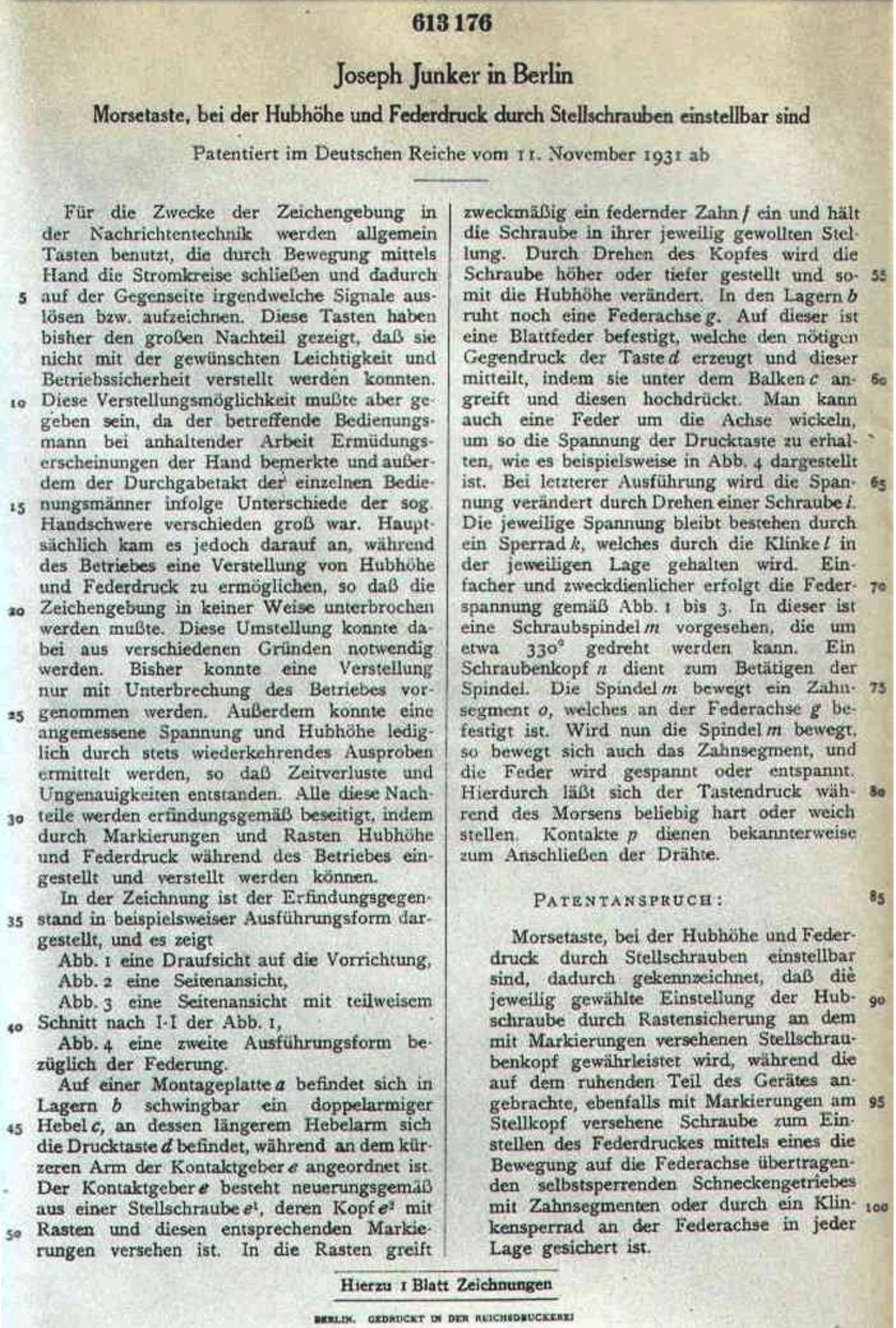 Erste Patentschrift für die Ausführung einer Morsetaste nach Kap. J. Junker von 1931